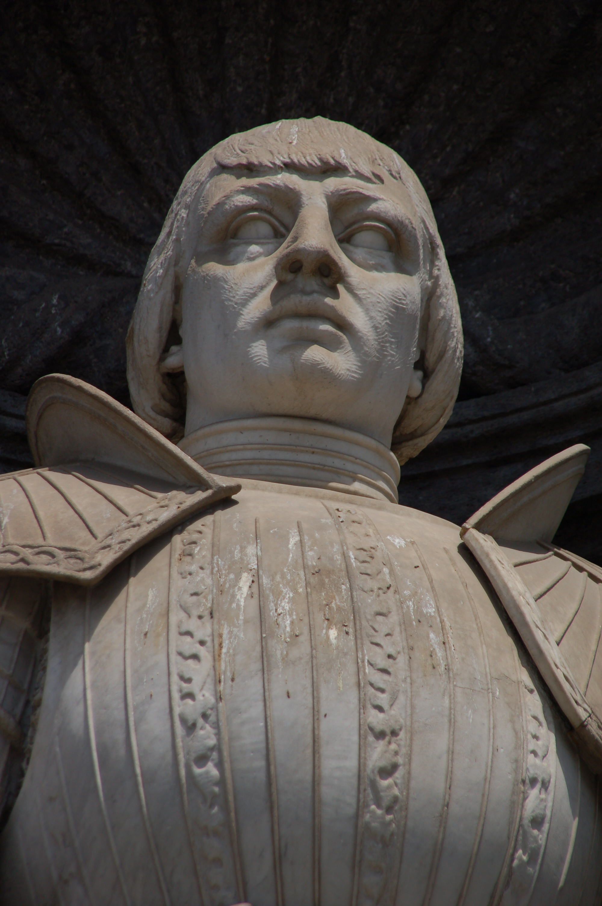 Statua sulla facciata del Palazzo Reale di Napoli: Alfonso V d'Aragona (Alfonso I di Napoli), re di Napoli.